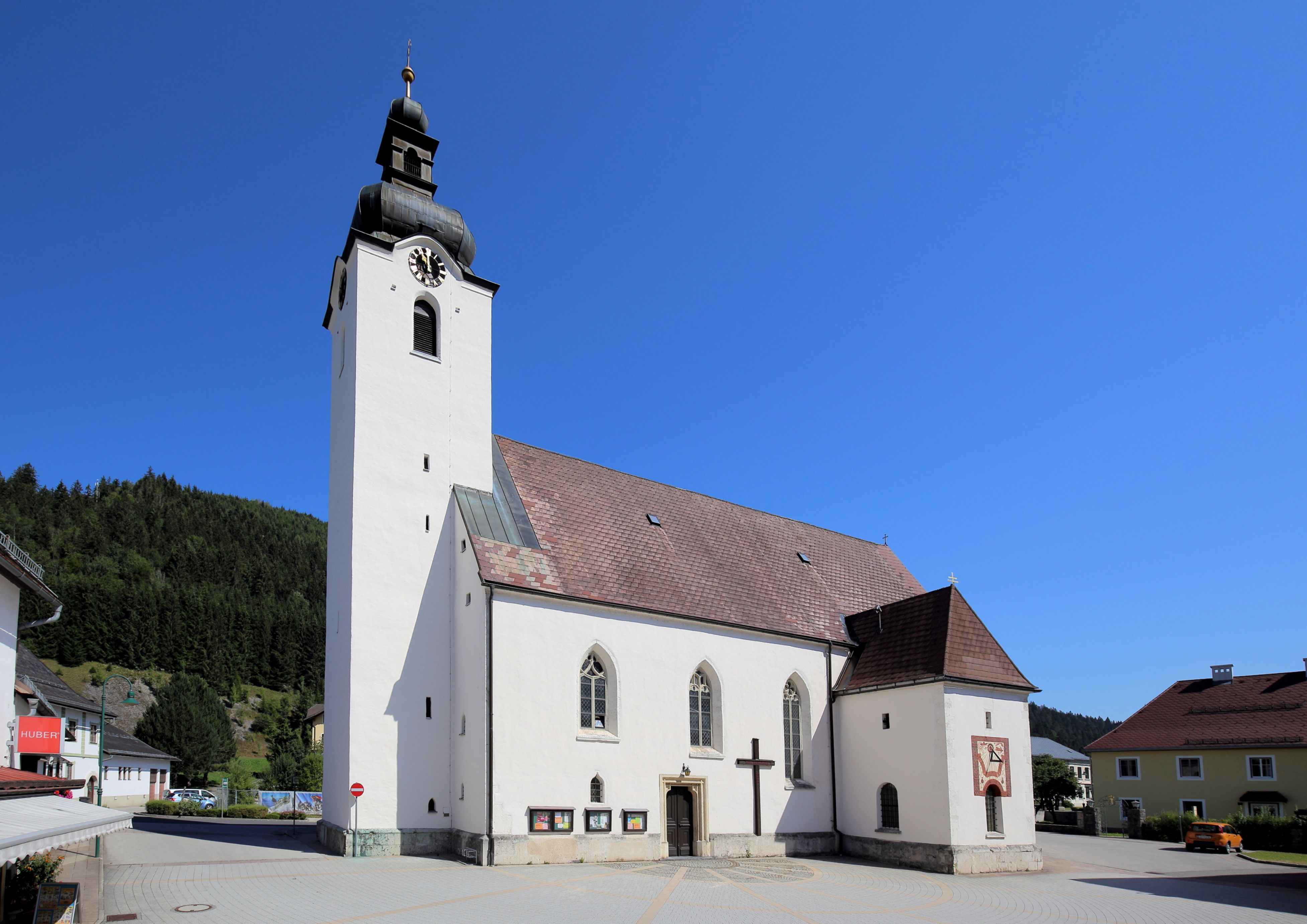 Südwestansicht der katholischen Pfarrkirche Hl. Drei Könige in der niederösterreichischen Marktgemeinde Lunz am See.Eine spätgotische, zweischiffige Hallenkirche mit durchlaufendem Doppelchor sowie einem vorgestellten Westturm und einem Sakristeianbau im Süden.